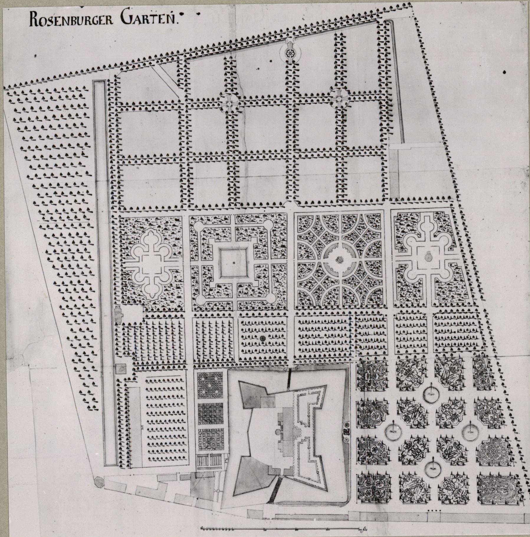 Kongens Have. Kort ca. 1740 i Kgl. Bibl. Fr. V's danske atlas.